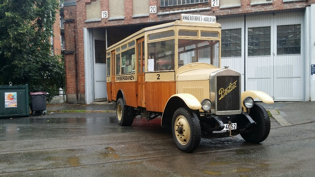 Berliet-buss levert til Ekebergbanen i 1924. Eksisterer i dag og er utstilt på Sporveismuseet i Oslo.